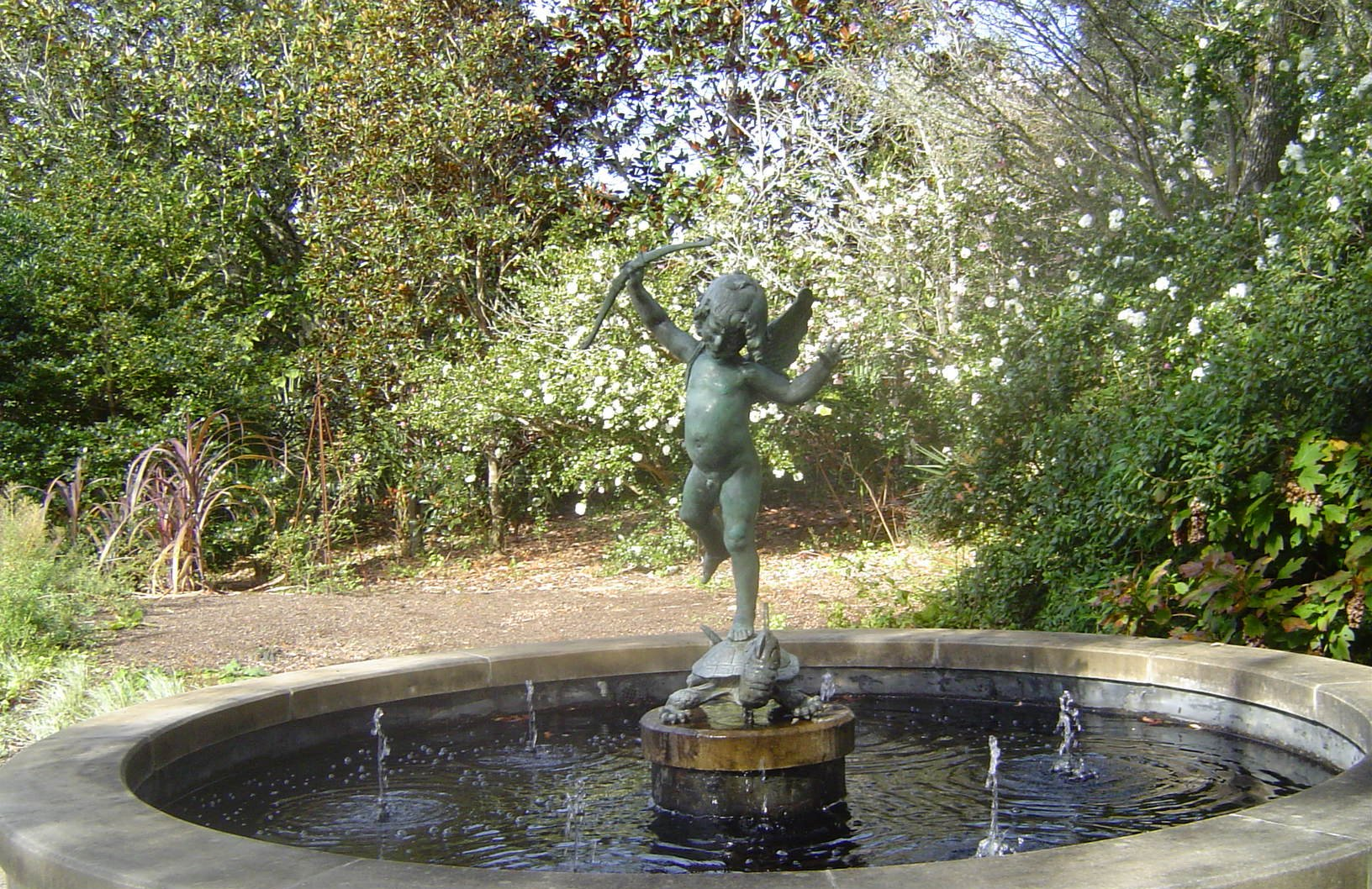 Brookgreen Gardens - in Anne's Garden. Tortoise Fountain, by Janet Scudder.